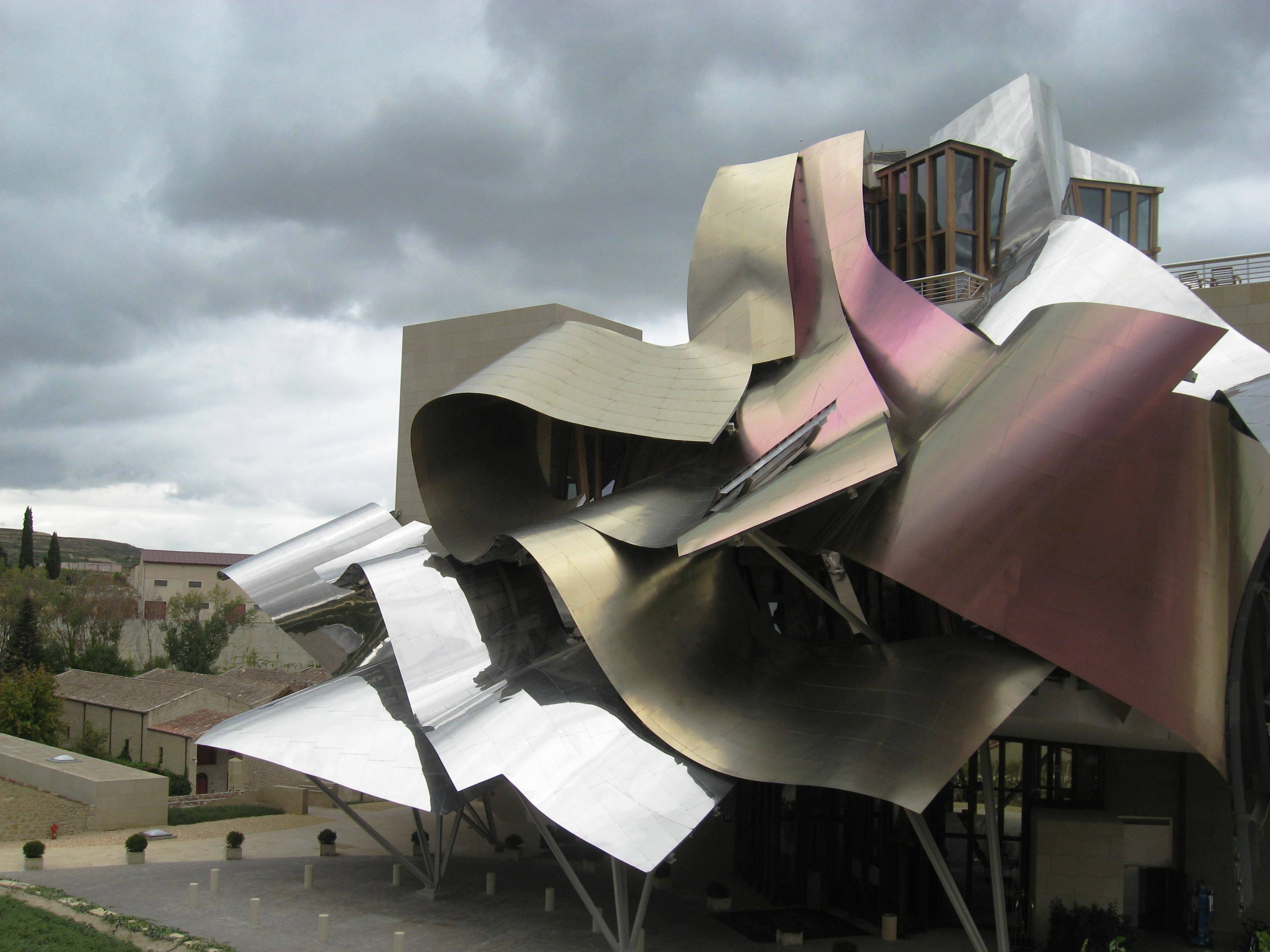 Hotel Marques de Riscal in Elciego, Spanien. Architekt Frank Gehry